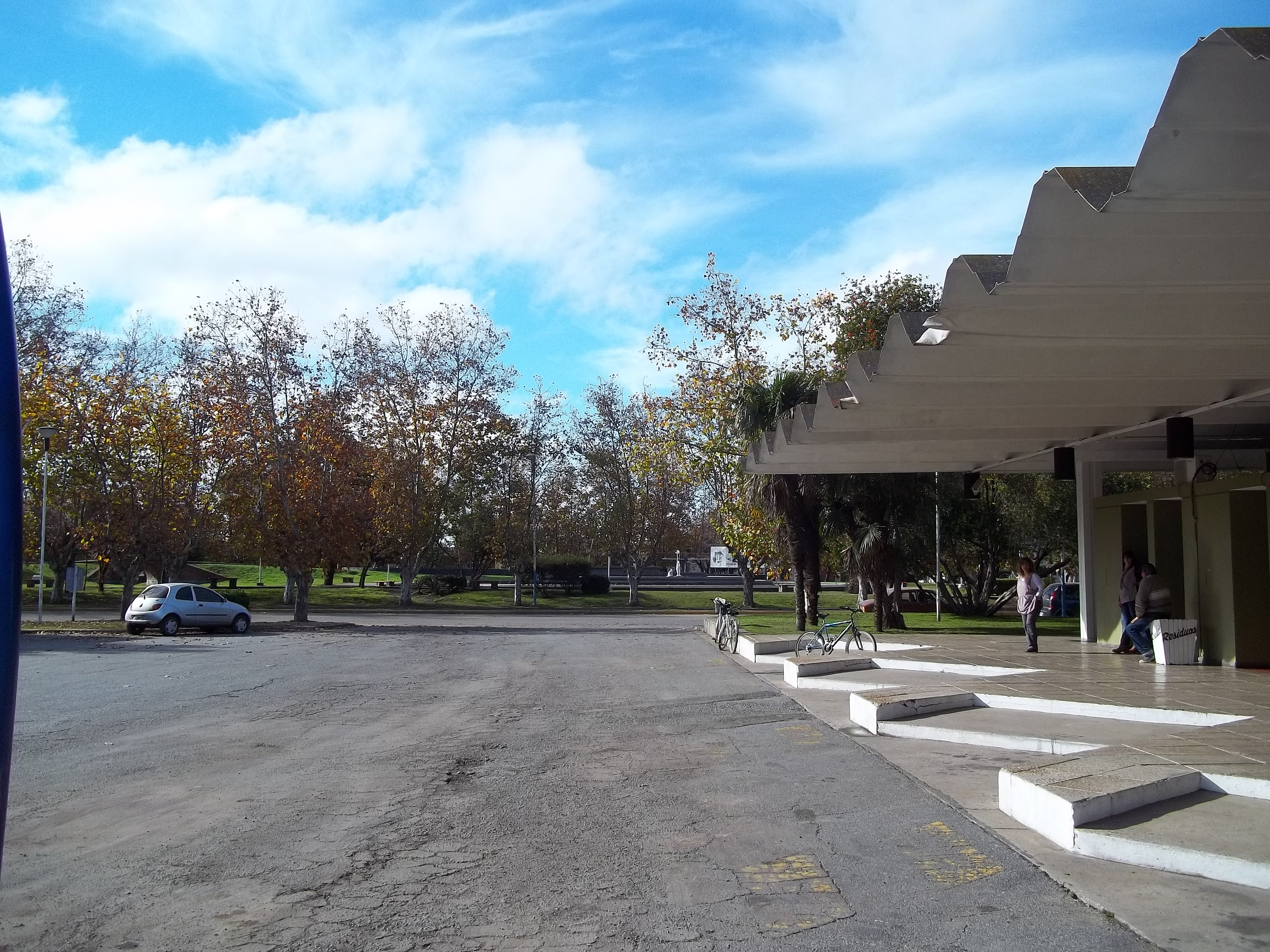 Vista desde la terminal de Rauch, Argentina